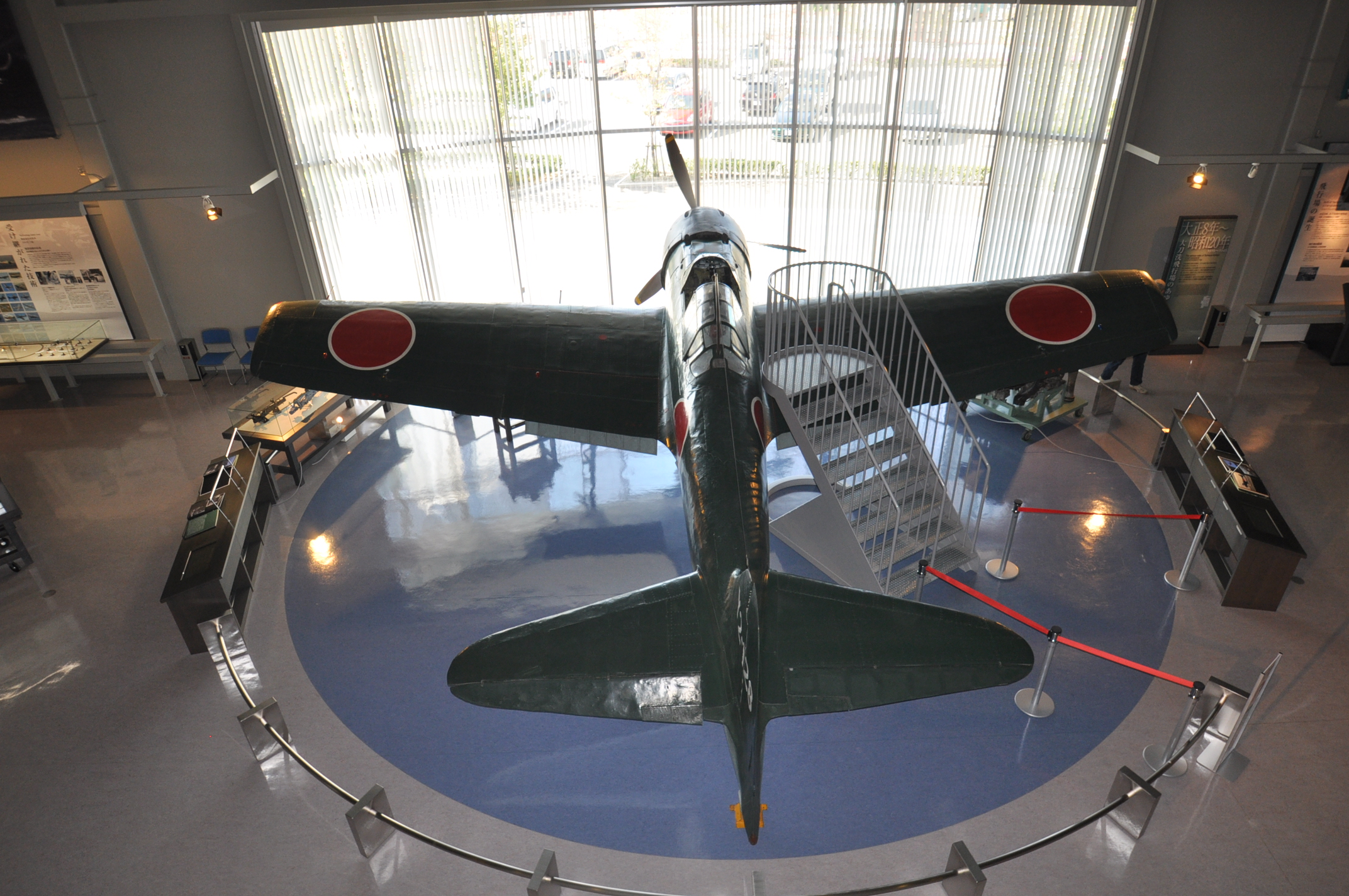 日本海軍零式艦上戦闘機３２型